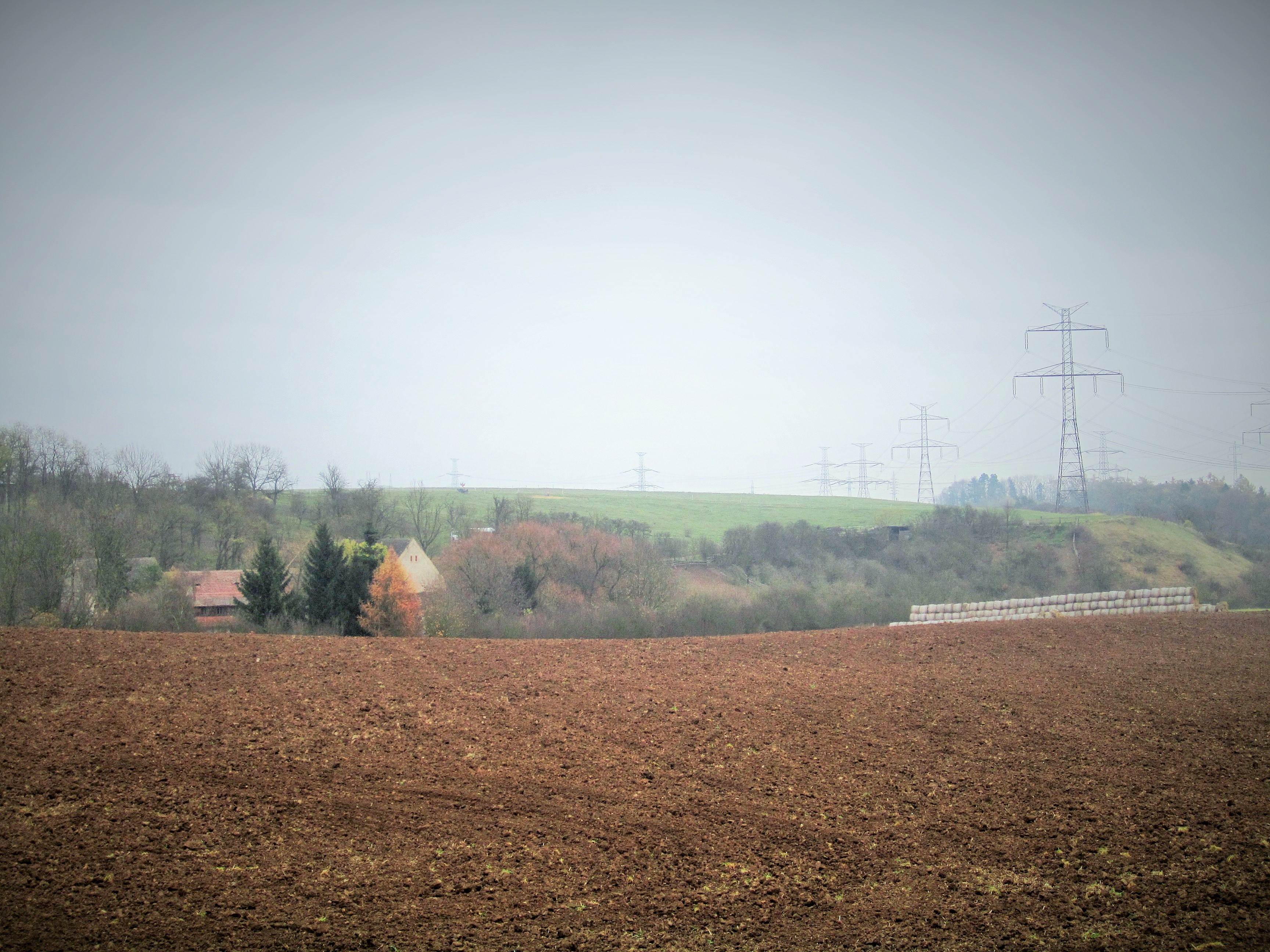 Pohled na Zmrzík ze Zadní kopaniny